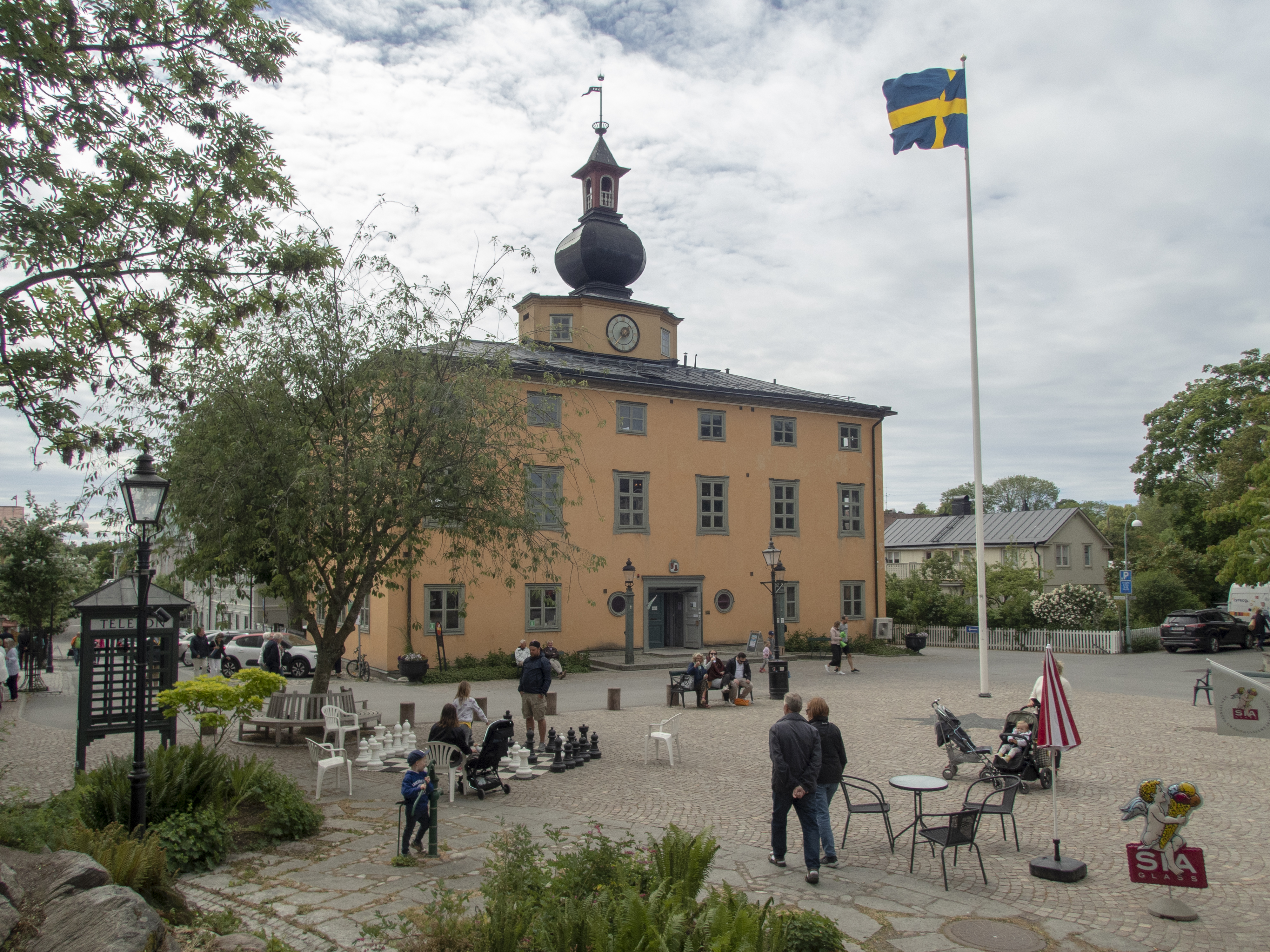 Vaxholms rådhus, Torget 1, Nybyggnadsår 1885, Ombyggt 1924 enigt Cyrillus Johanssons ritningar.